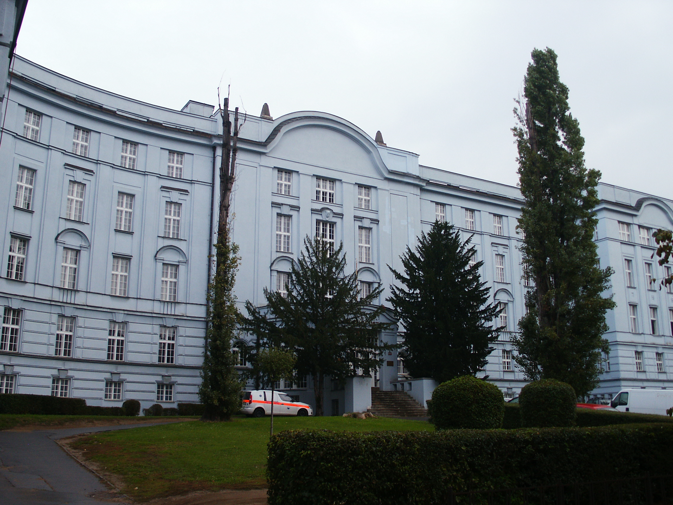 Hlavův ústav, Praha 2, Studničkova 2039/2 a 4, Albertov 2039/9